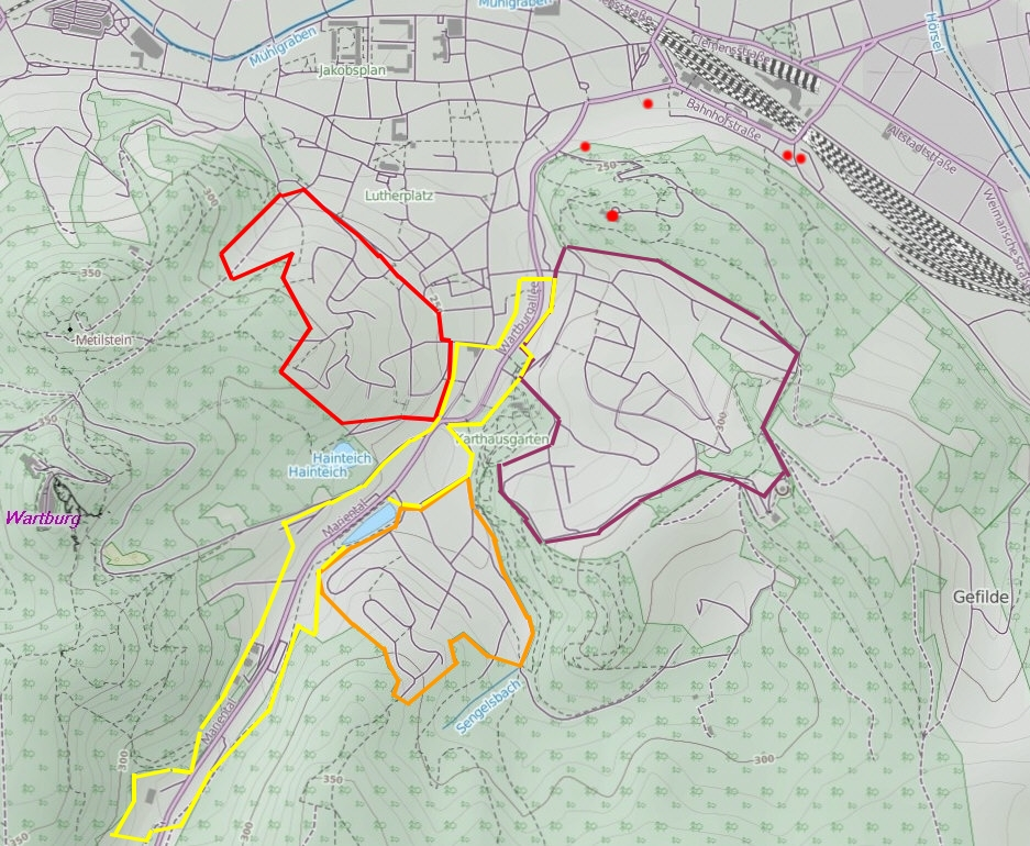 Villengebiete im Süden der Stadt Eisenach. Rote Punkte - weitere Villen außerhalb der Südstadt.